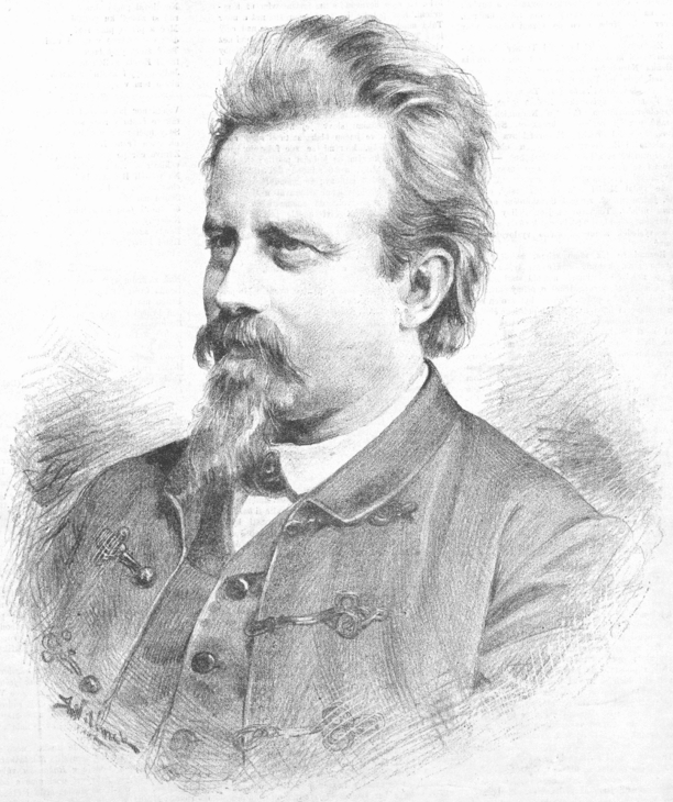 Emanuel Tonner (1829 - 1900) - český středoškolský profesor, politik a historik, spoluzakladatel Sokola. Portrét, nakreslený Janem Vilímkem pro Humoristické listy